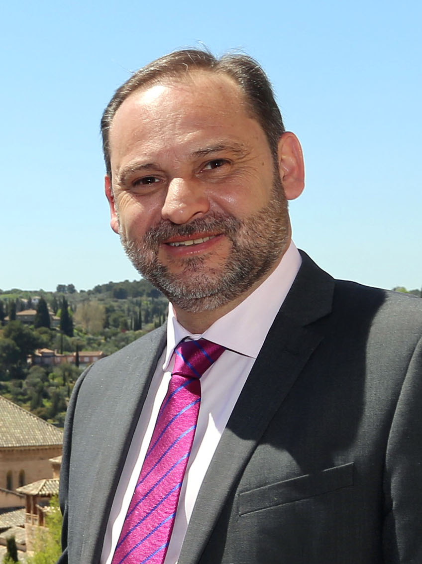 Toledo, 18 de abril de 2018.- El presidente de Castilla-La Mancha, Emiliano García-Page, durante el encuentro que ha mantenido este miércoles, en el Palacio de Fuensalida, con el secretario federal de Organización del PSOE, José Luis Ábalos. (FOTOS: Álvaro Ruiz/JCCM)